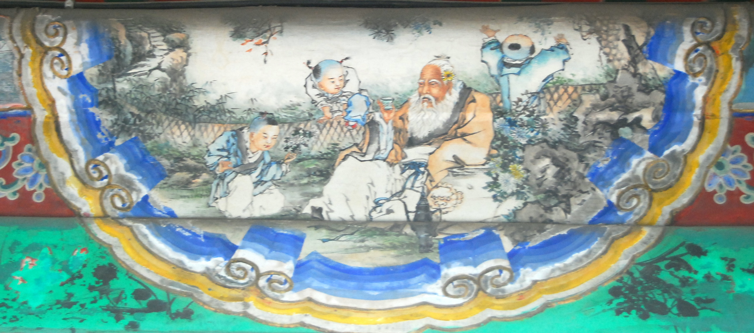 颐和园长廊上的彩绘：渊明爱菊